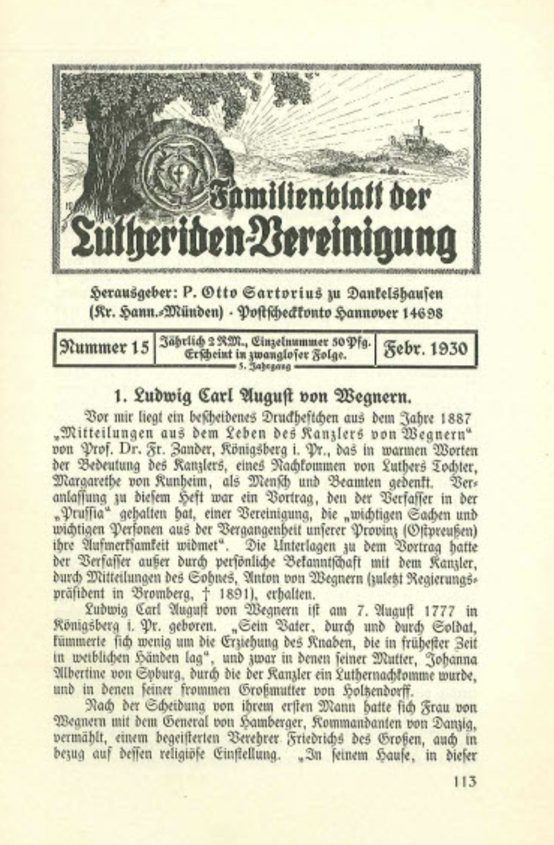 Titelblatt Familienblatt 02 1930 mit dem Logo der Familienblätter